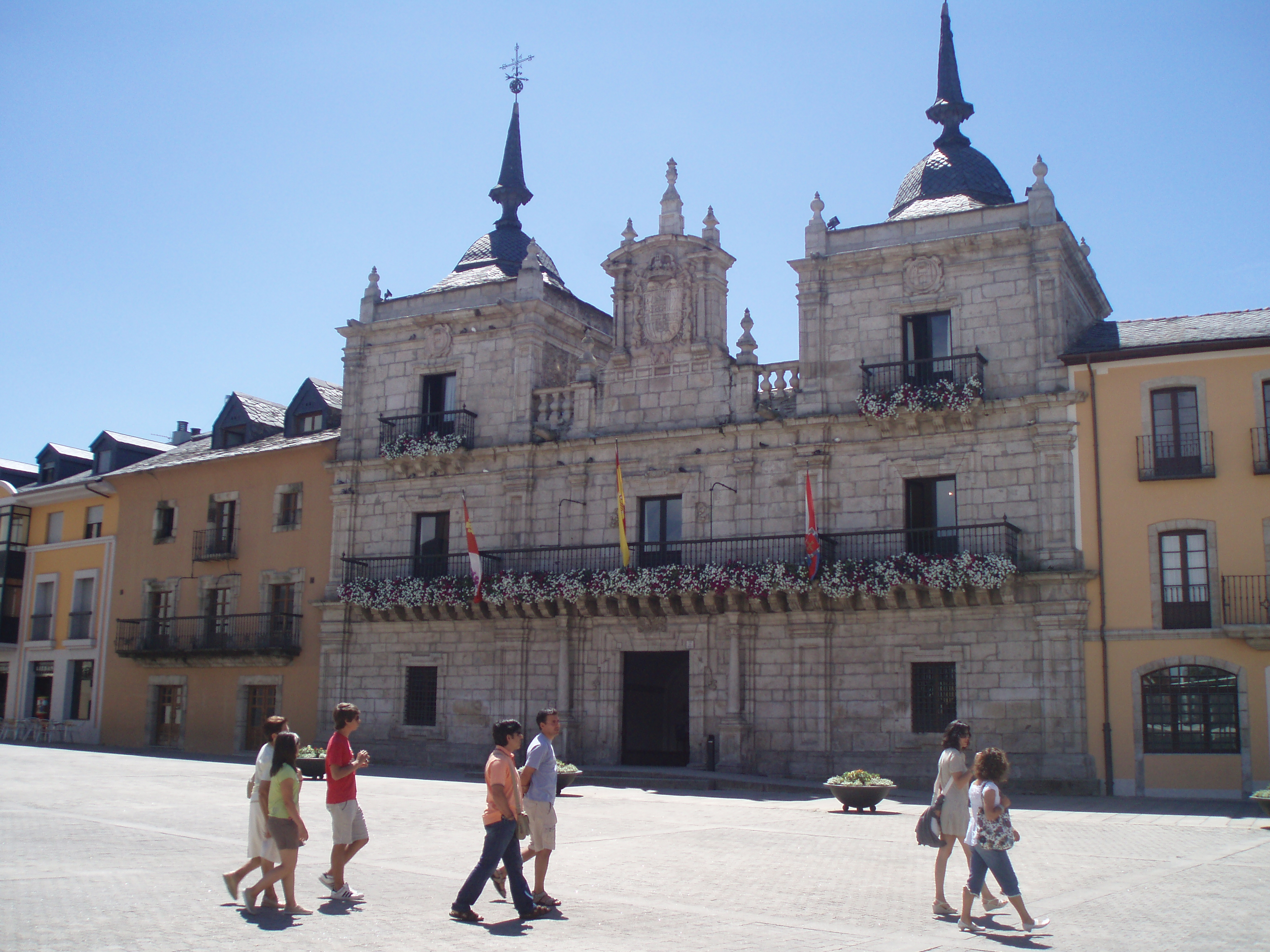 Fachada del Ayuntamiento de Ponferrada (siglo XVII).